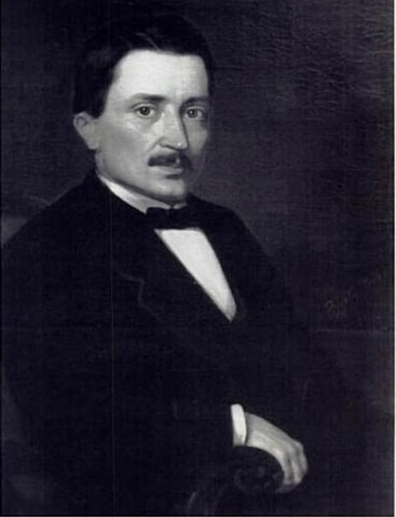 Amón Fasileau-Duplantier fue un inmigrante francés a Costa Rica y de él proviene el nombre del barrio Amón, en San José